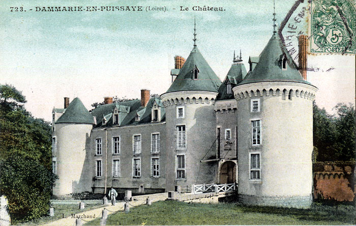 Le château de Dammarie-en-Puisaye, Loiret, France